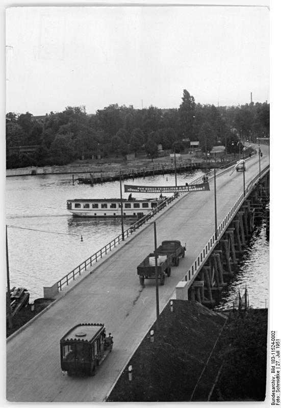 Berlin, Stralauer Brücke, Passagierschiff Illus Schmidtke 27.7.51 Die Stralauer Brücke. Die Stralauer Brücke, die Treptow mit Stralau verbindet, wurde am 25.7.51 durch Oberbürgermeister Friedrich Ebert dem Verkehr übergeben.